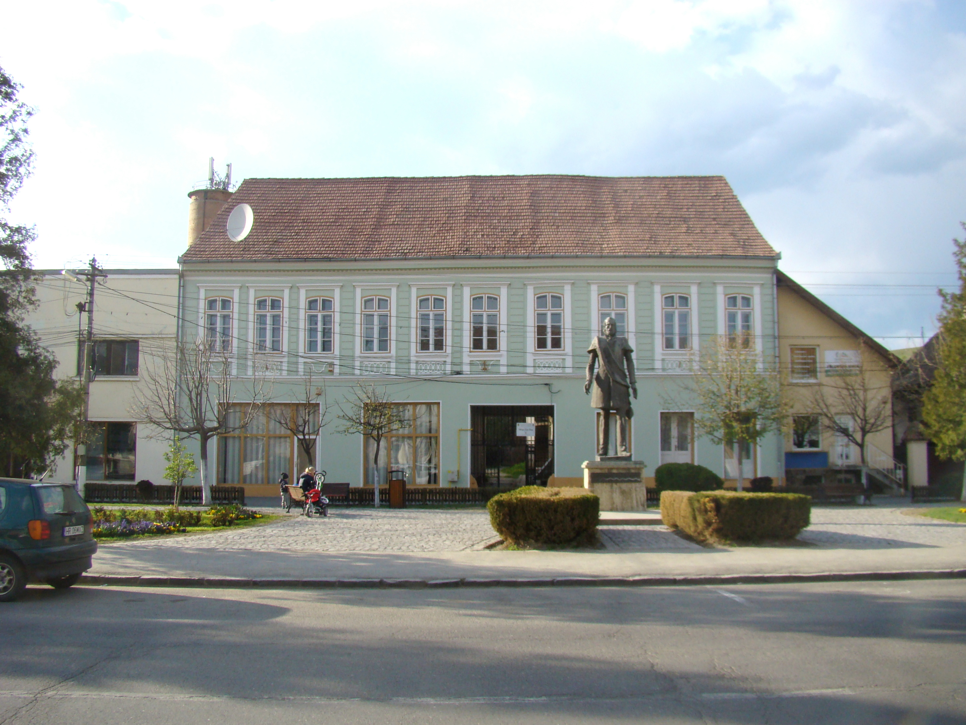 Ansamblul urban „Piața Libertății I” - clădiri de locuit cu magazine la parter, oraș Cristuru Secuiesc, Piața Libertății, nr. 1-T sf. sec. XIX-înc. sec. XX